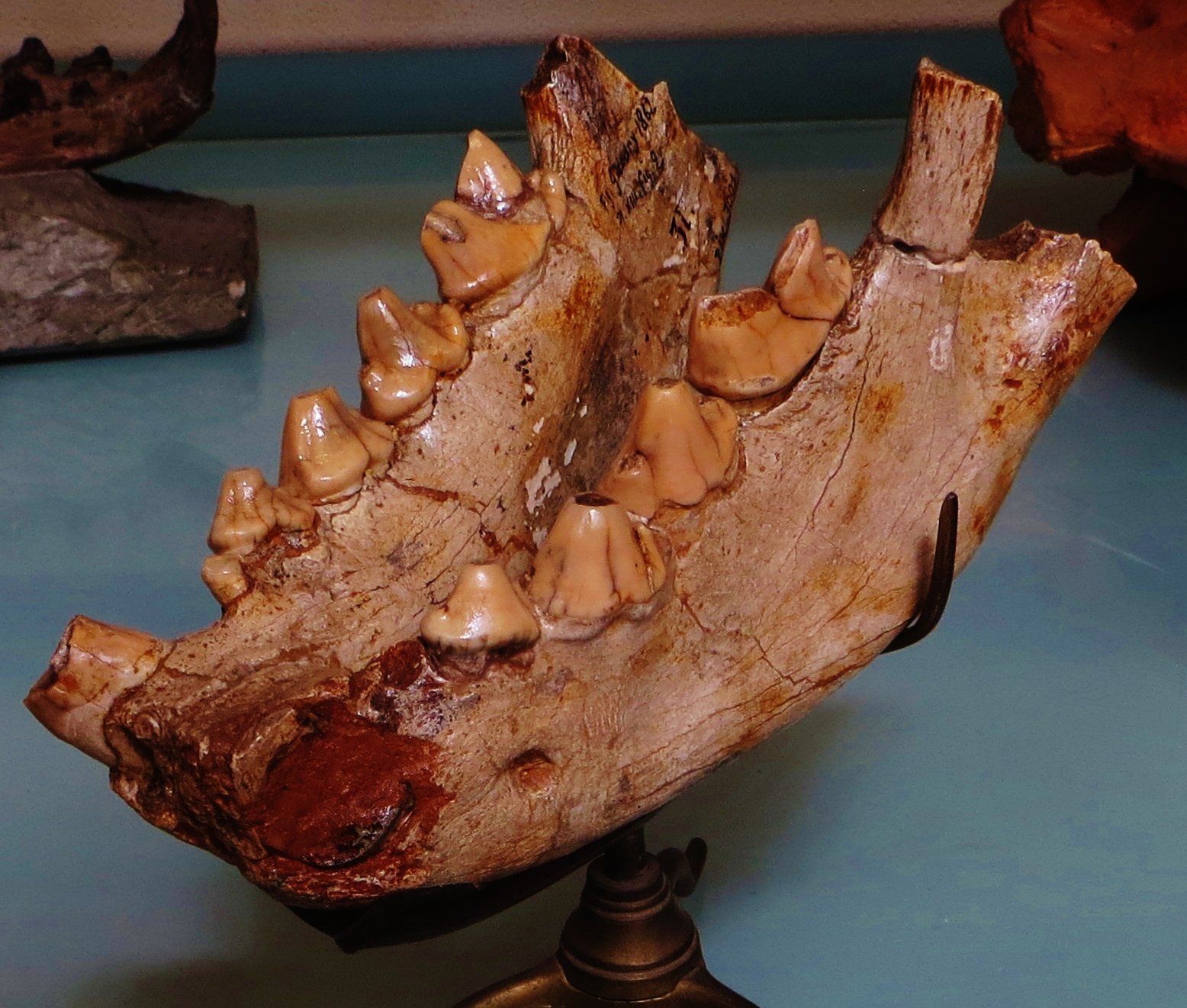 Fossil of Adcrocuta, an extinct mammal - Took the photo at Museum Histoire Naturelle, Paris